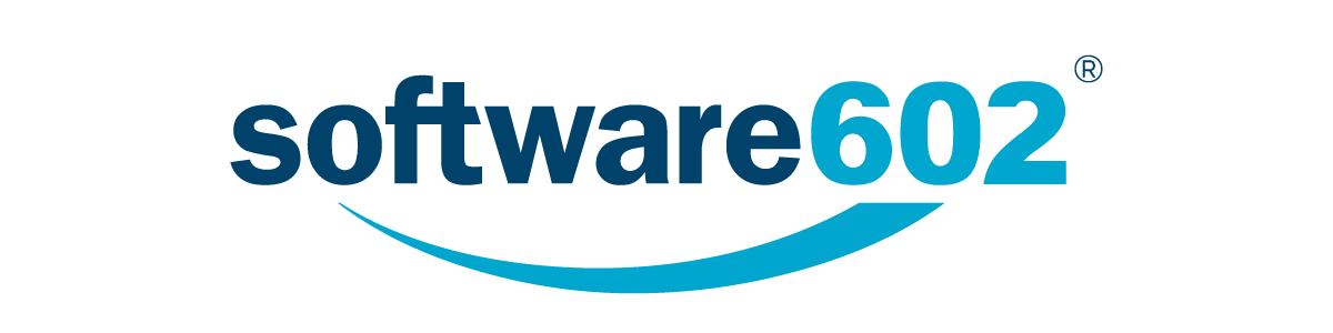 Logo společnosti Software602 a.s.